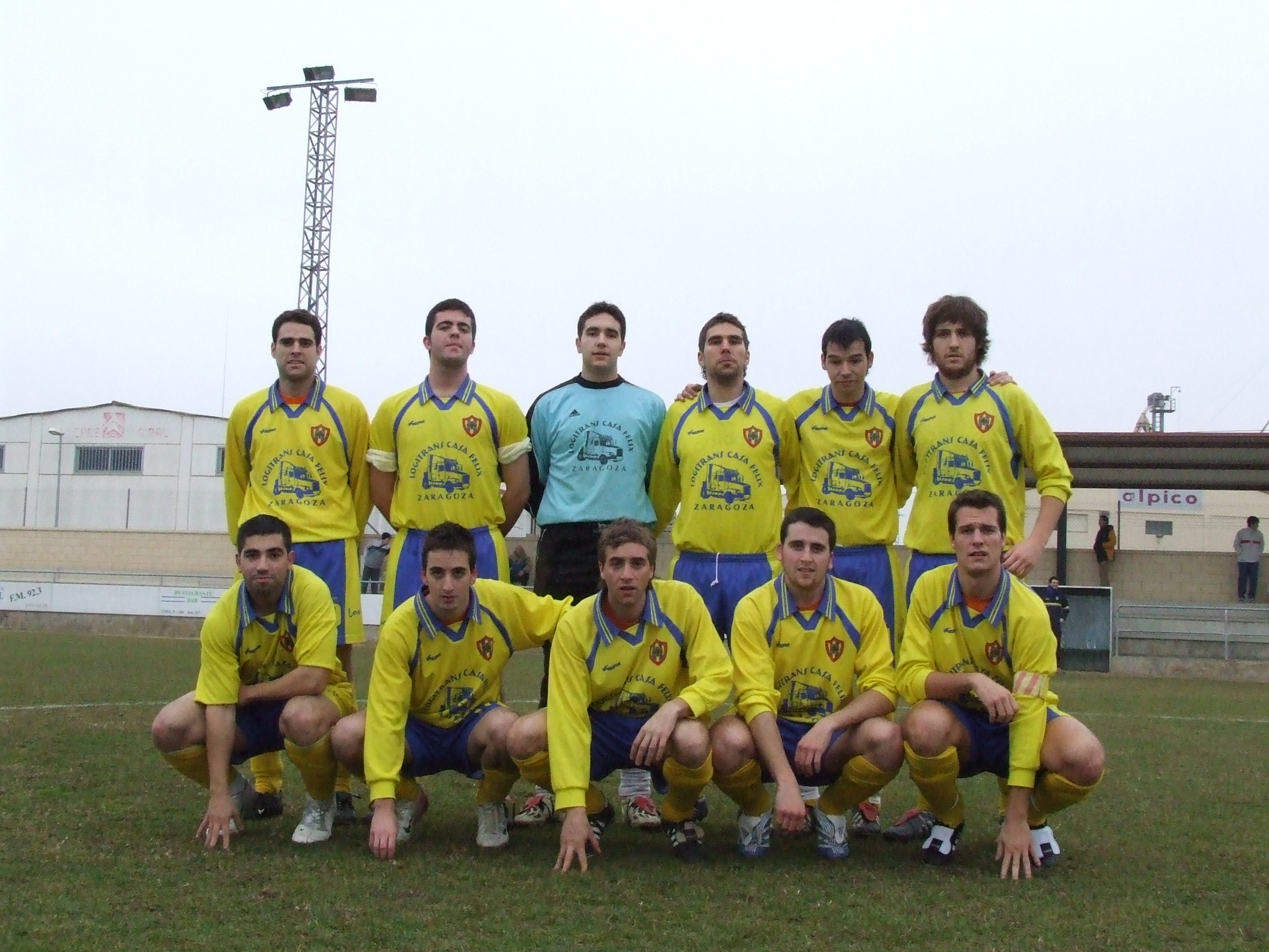 UD Los Molinos